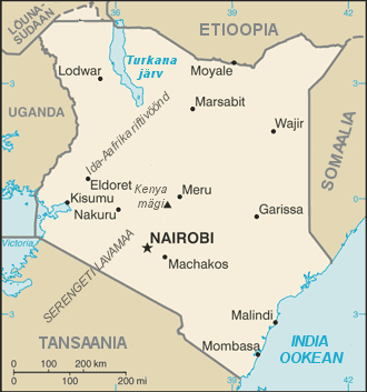 Keenia kaart